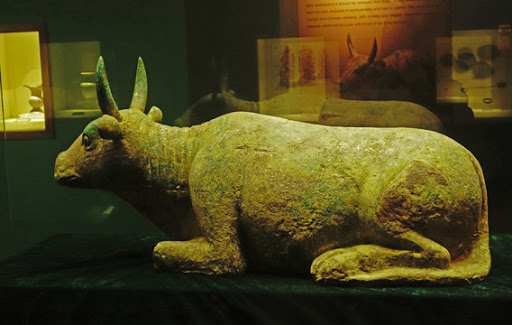 the Xixia gilt bronze bull statue,11th century.Bronze, 1.2 meters long, 0.38 meters wide, 0.45 meters high, empty in the middle, weighing 188 kg